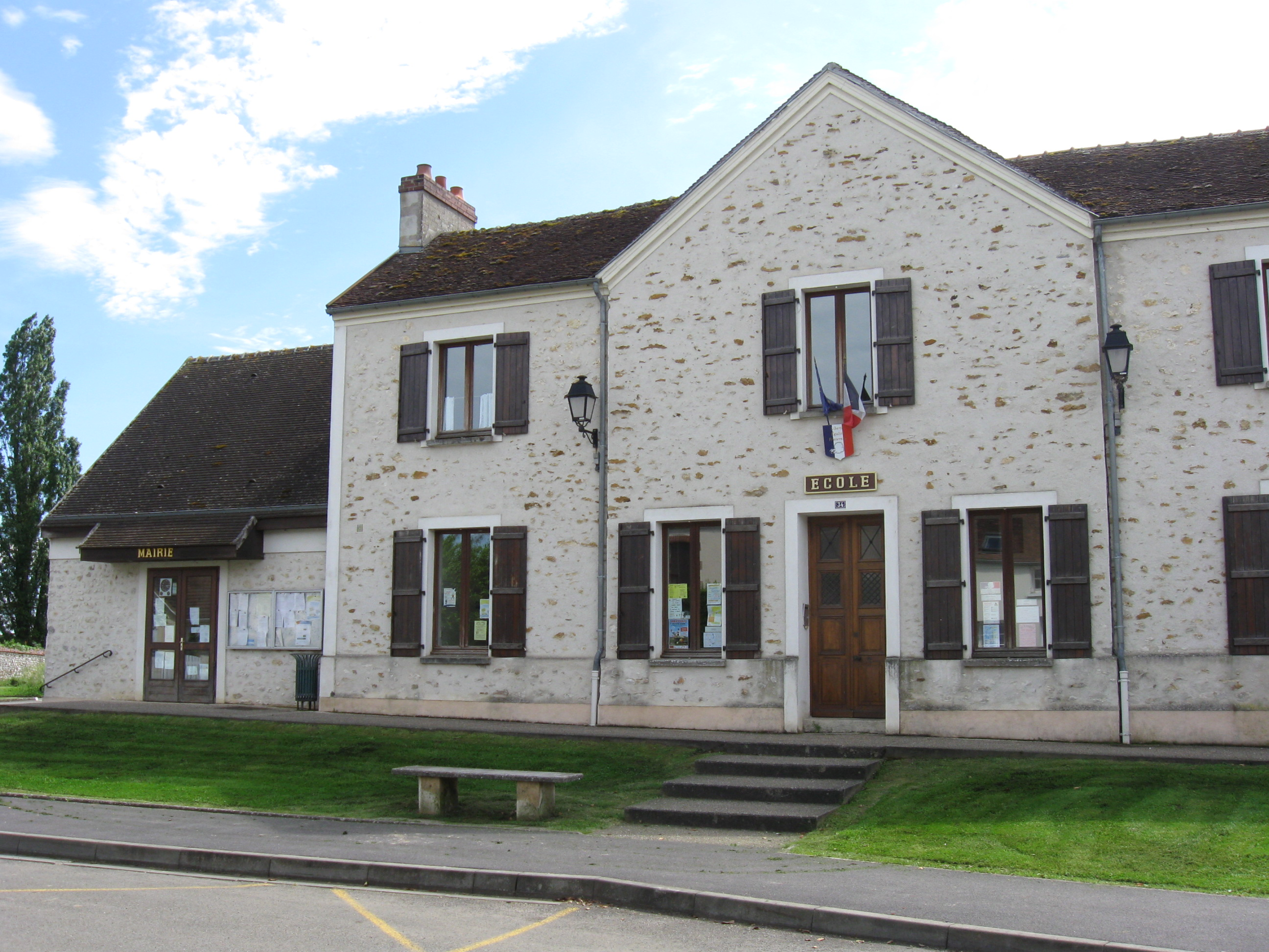 Mairie de Chartronges. (Seine-et-Marne, région Île-de-France).